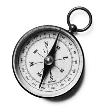 brujula